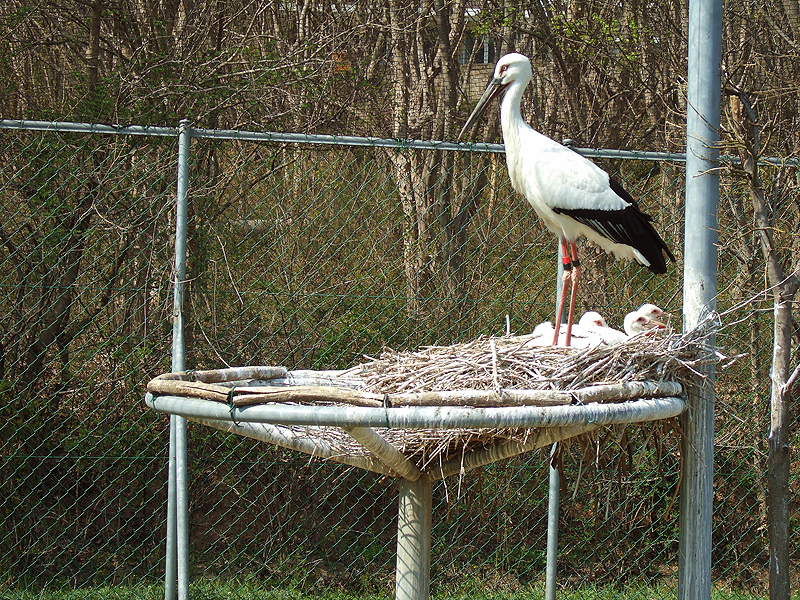 Research Center for Oriental White Stork an der Korea National University of Education